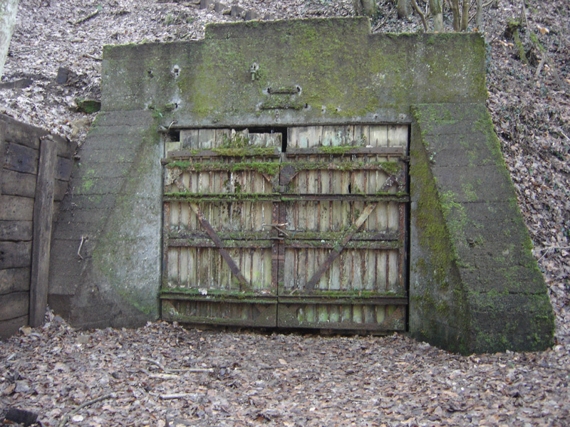 Agang vun der Stopp Hondsbësch